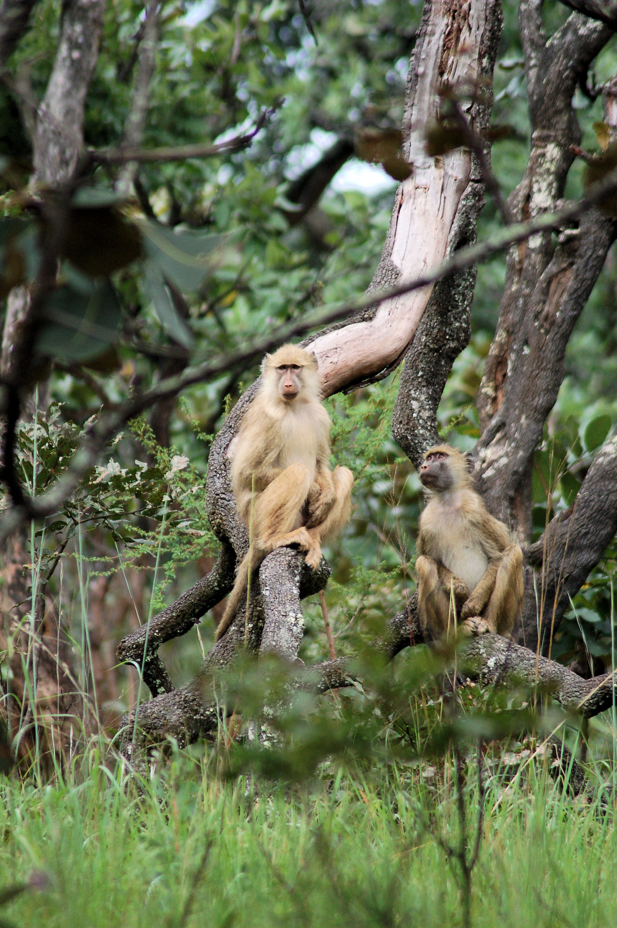 Baboons, Nyika National Park, Malawi